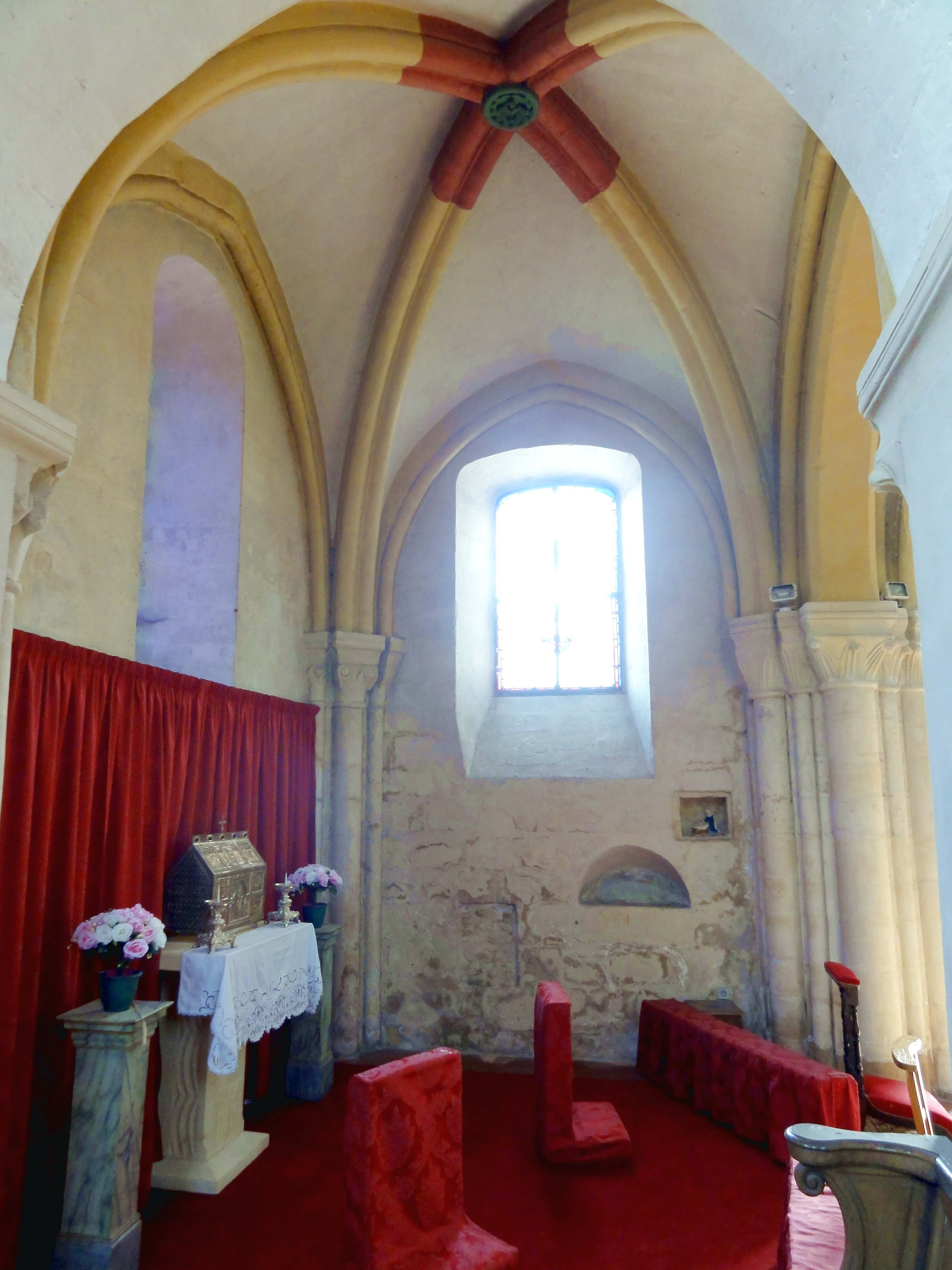 Intérieur de l'église - voir titre.